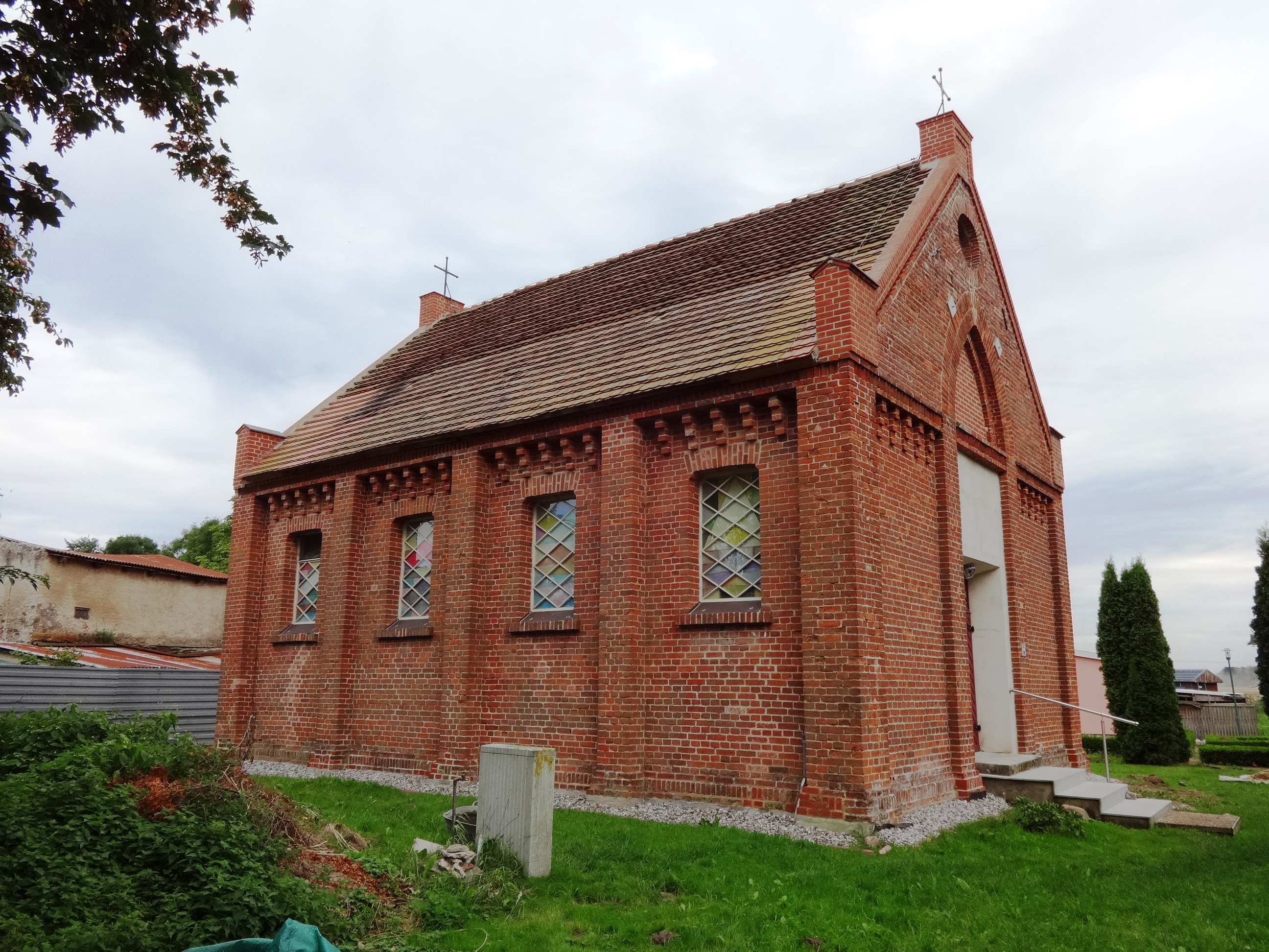 Kapelle in Alt Pansow, Ortsteil von Dersekow in Mecklenburg-Vorpommern